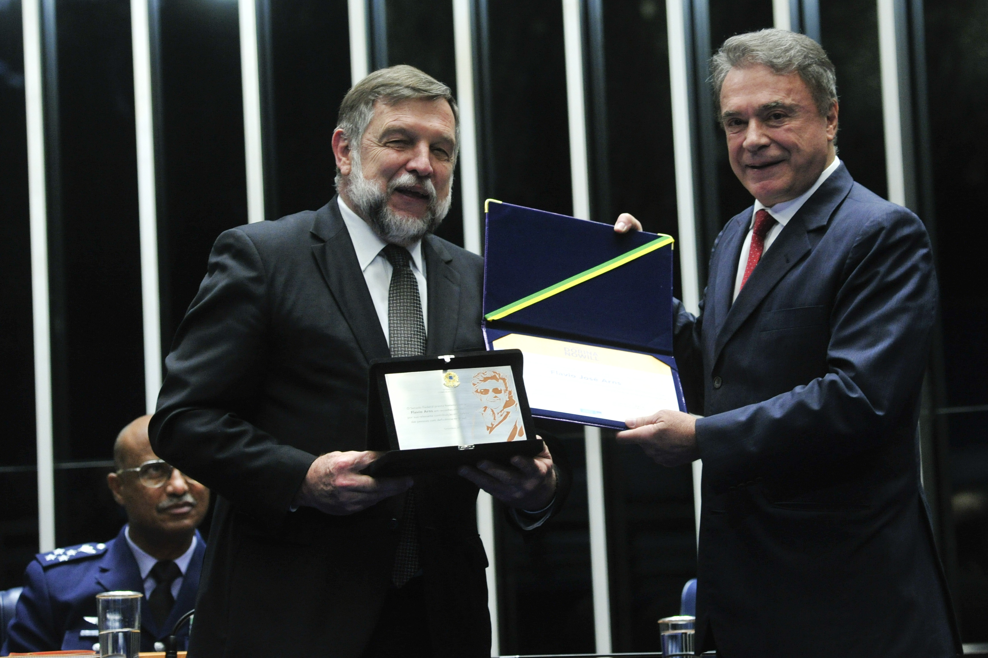 Sessão Especial do Senado Federal destinada a Comemorar o Dia Nacional de Luta das Pessoas com Deficiência e a entrega da Comenda Dorina de Gouvêa Nowill aos agraciados, em sua 2ª edição. Mesa: ex- senador e presidente da Federação Nacional das Apaes e presidente da Associação Brasileira de Desportos de Deficientes Mentais, Flavio Arns; senador Alvaro Dias (PV-PR). Foto: Geraldo Magela/Agência Senado